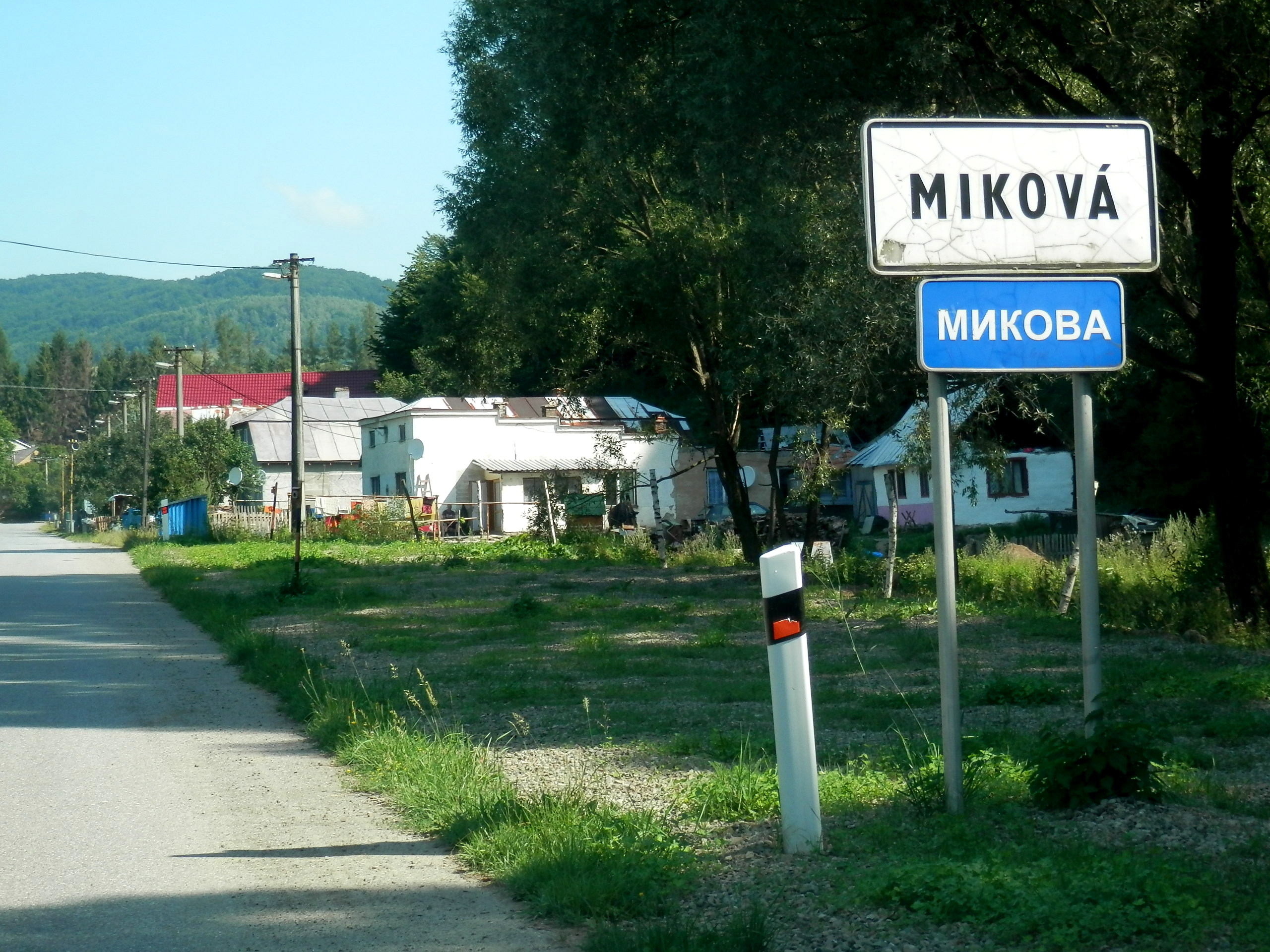 Obec Miková, sa v archívnych písomnostiach po prvý raz spomína v roku 1390. Historicky patrí do regiónu Šariš, územno-správne do Prešovského kraja. V súčasnosti v nej žije takmer 170 obyvateľov. Je rodiskom rodičov svetového moderného maliara Andyho Warhola. Málo známou raritou je, že v obci Miková sa od roku 1913 do roku 1951 ťažila ropa. Celkovo bolo v Mikovej vyvŕtaných sedemnásť vrtov v hĺbke 50 až 250 metrov.